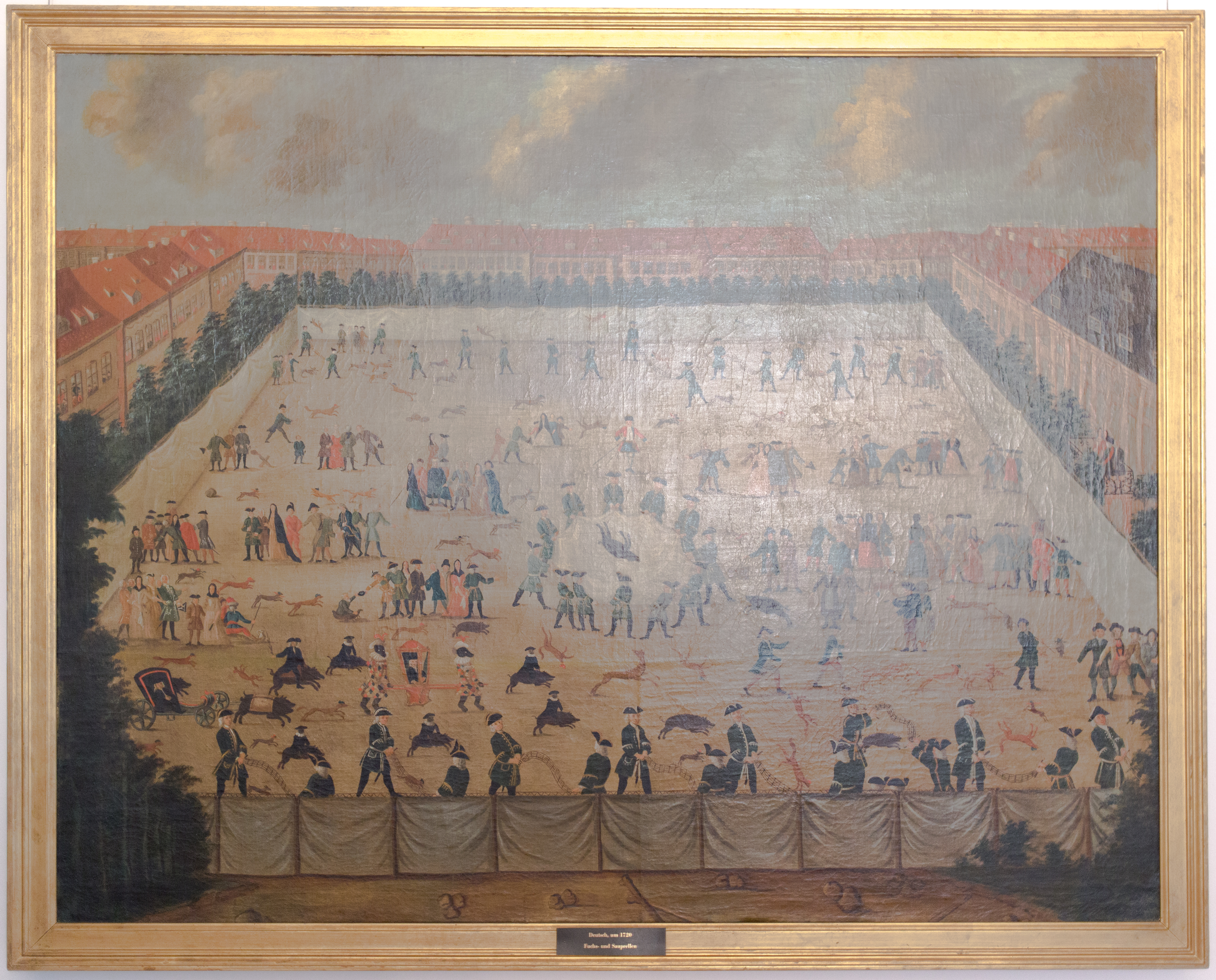 Unbekannter Künstler Fuchs- und Sauprellen. um 1720 Das „Prellen-„ von Tieren galt als lustiger Zeitvertreib und fand auch am Hof Friedrich Wilhelms I. statt. Die Tiere wurden dazu eingefangen, unter die Menschen gescheucht und mit Leitern oder Tüchern in die Luft geworfen. Nach mehrmaligen Stürzen verendeten sie.